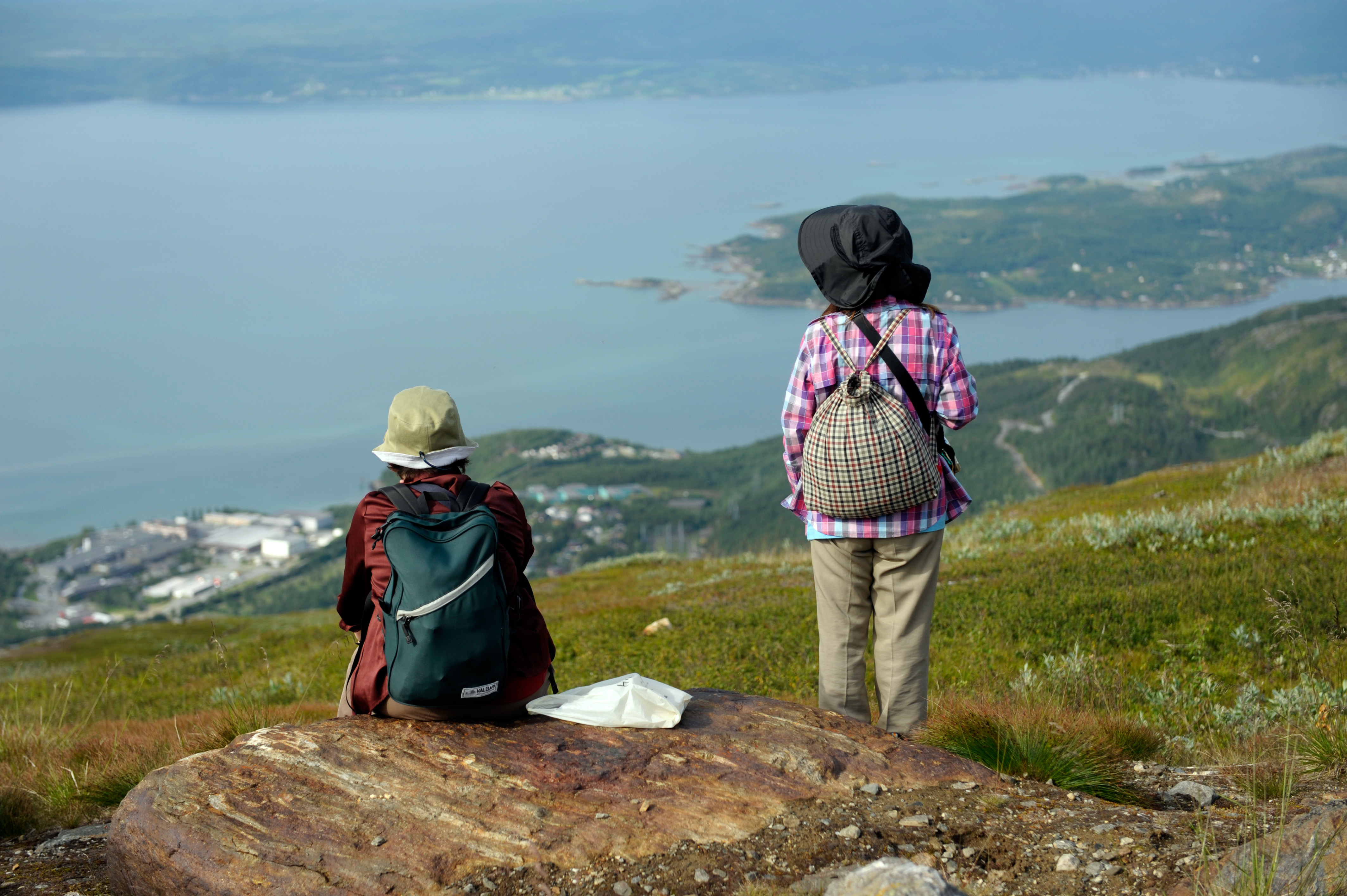 Asiatiska turister i Narvik Norge Keywords: Nature, Travel, Tourism, Norway